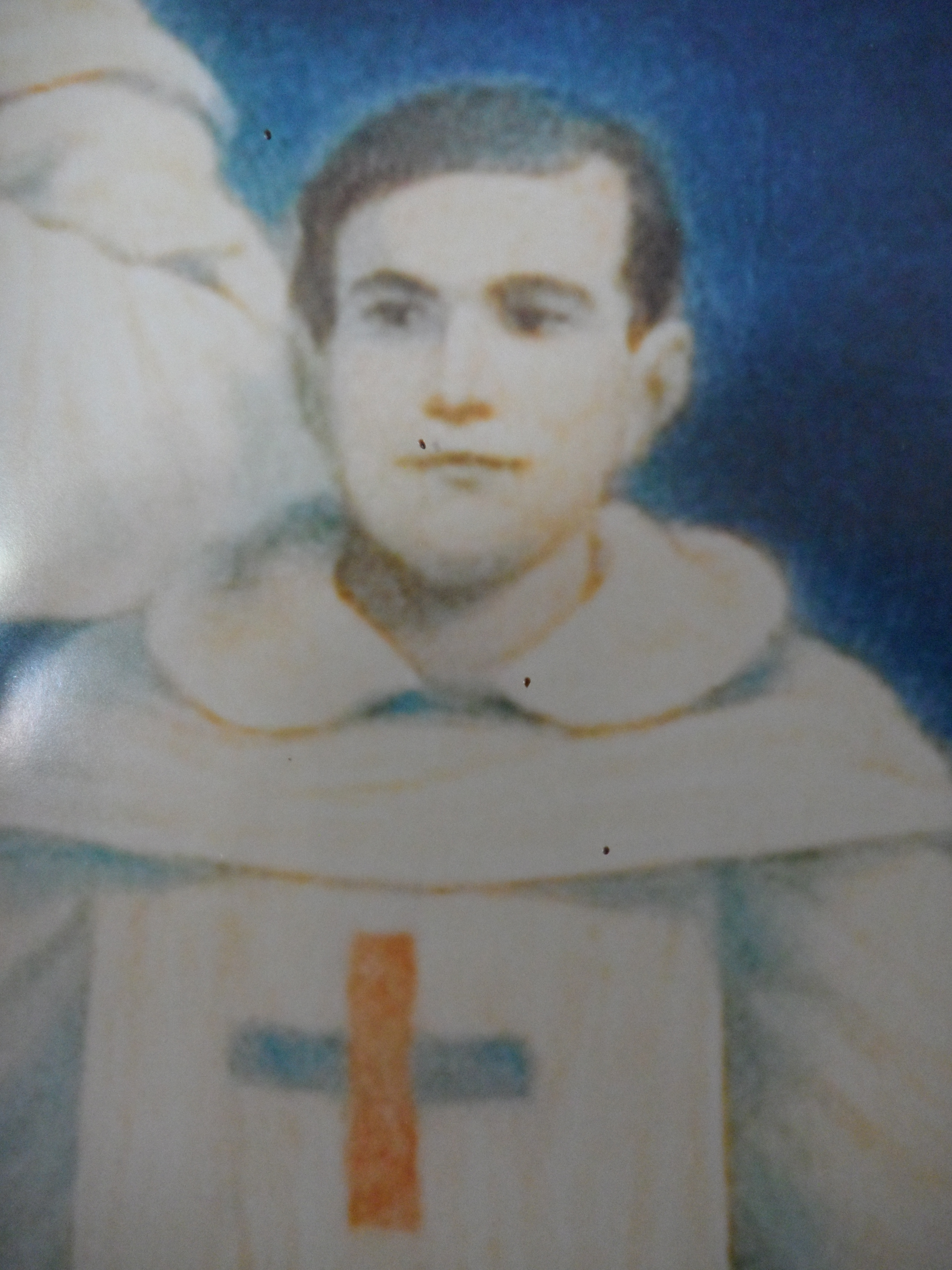 Particular del lienzo con motivo a la beatificación de Mariano de San José y compañeros mártires trinitarios. Convento de San Carlo alle Quattro Fontane.